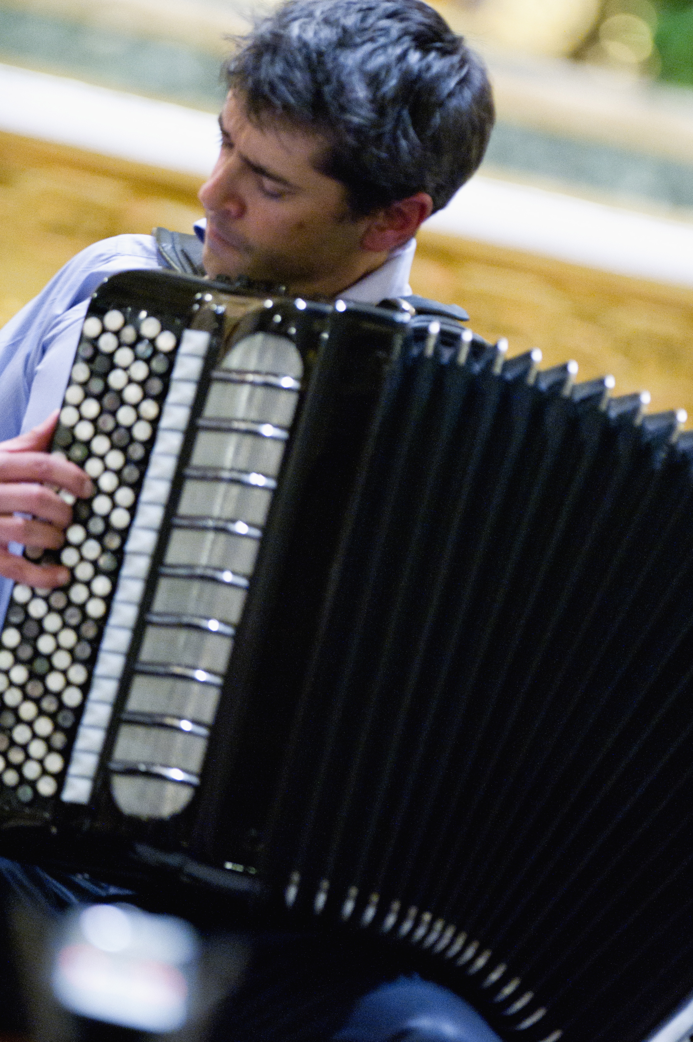 Bruno Maurice en récital à l'église San Antonio, Rome. 16/11/2013